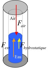 Schéma des forces de pression à l'intérieur du Ludion.